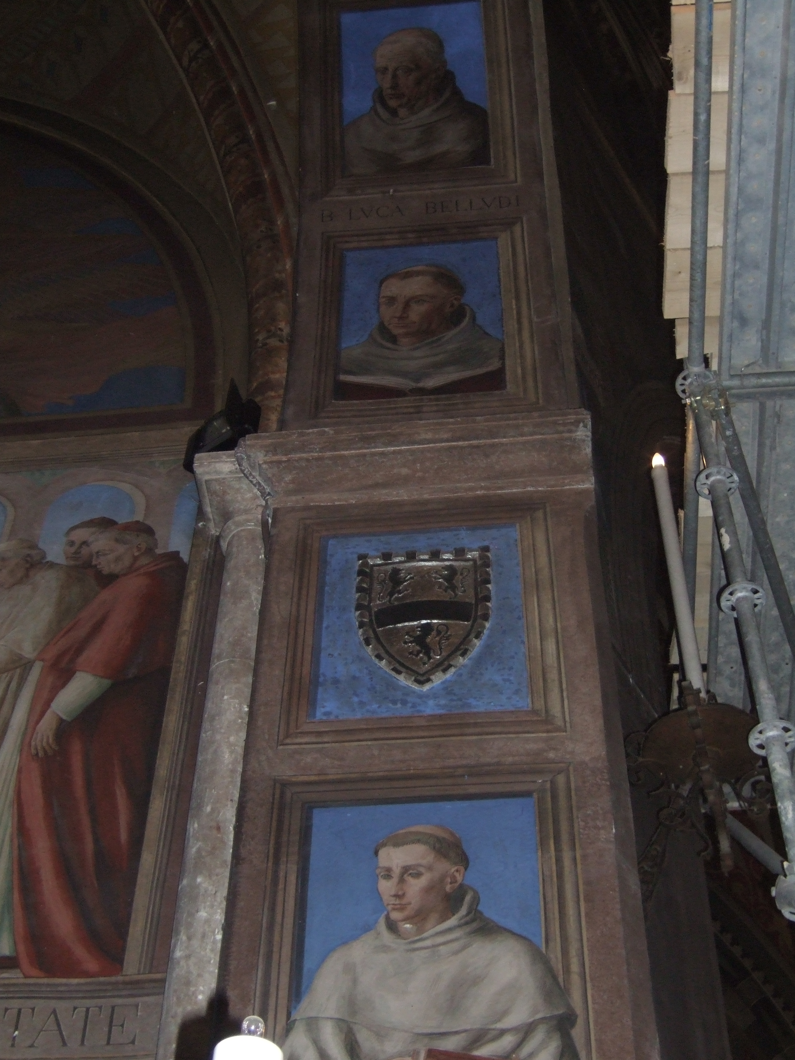 Padova - Basilica di sant'Antonio - Cappella di San Francesco - Affreschi arco entrata